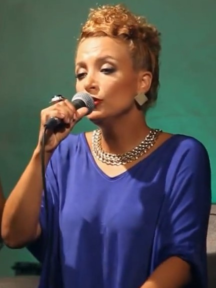 Akustikhane'de Su Soley